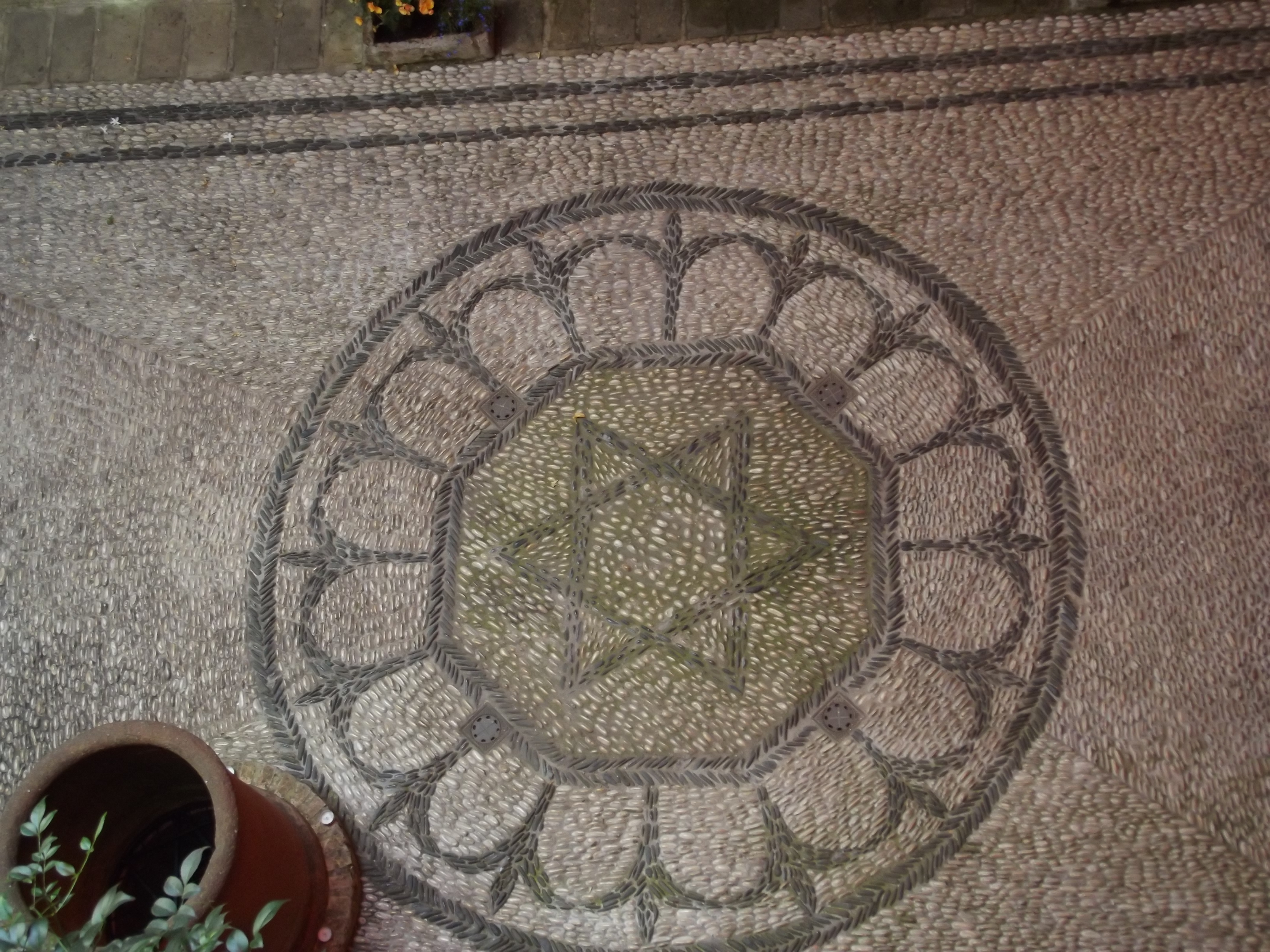 Casa de Sefarad, Córdoba (España).